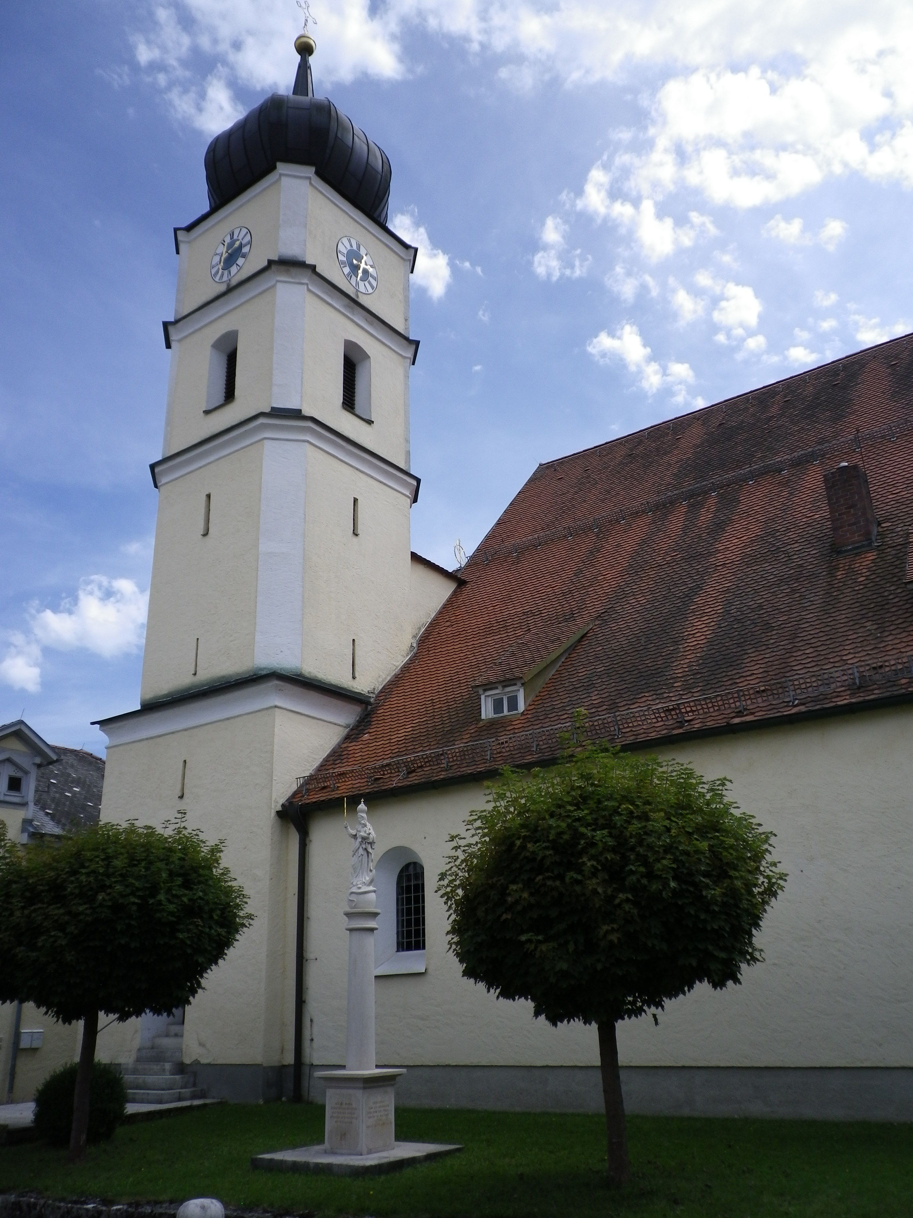 Kirche in Titting